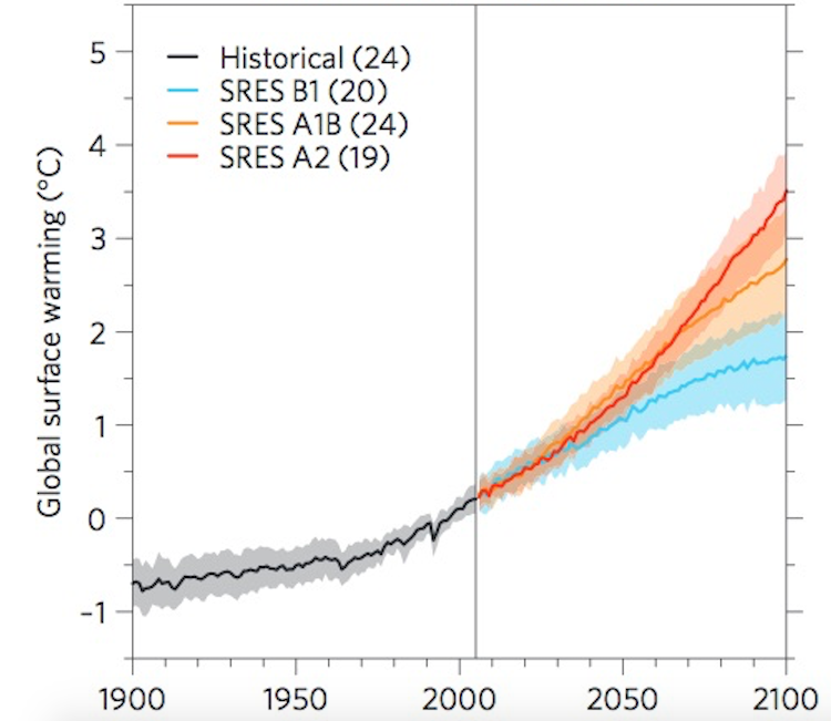 Српски (ћирилица): Предвиђене промене средње глобалне температуре ваздуха по ИПЦЦ сценаријима до краја 21. века